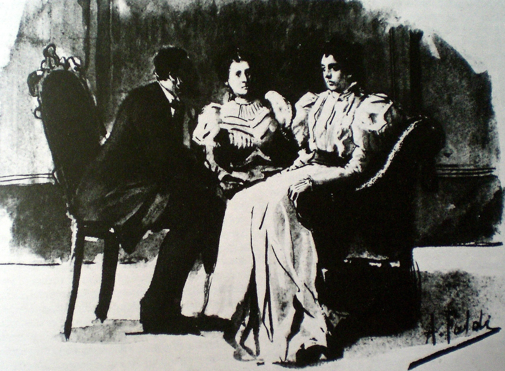 Dibujo que representa el momento en que Juan Pietri da el pésame a Jacinta Parejo de Crespo.